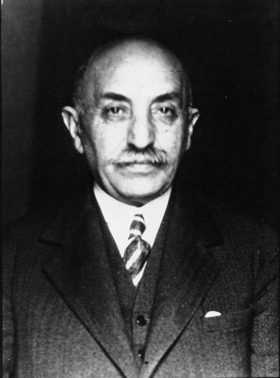 Panagiotis Tsaldaris, presidente del Partido Populista griego, 1932.